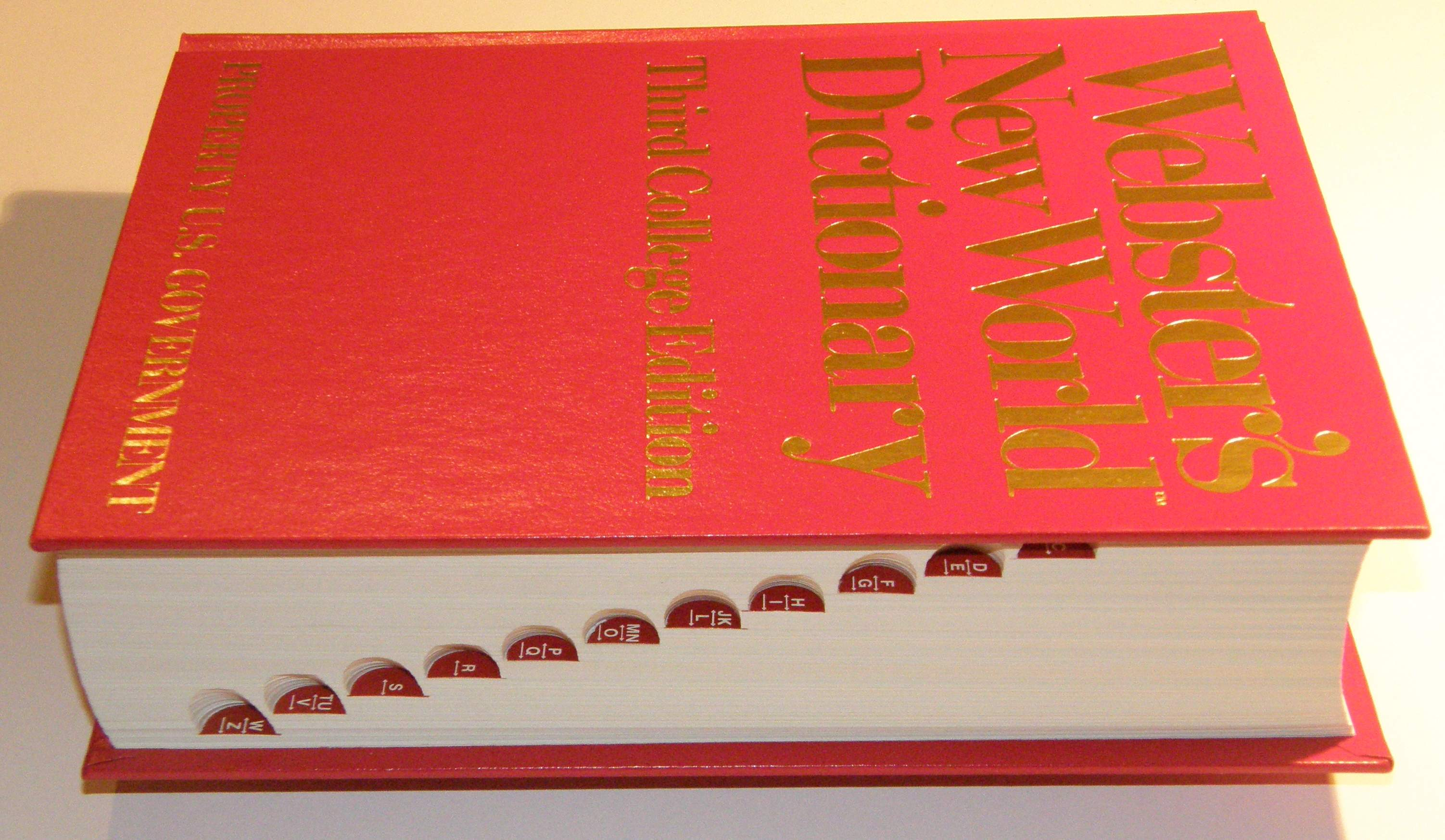 Daumenmarke im Lexikon